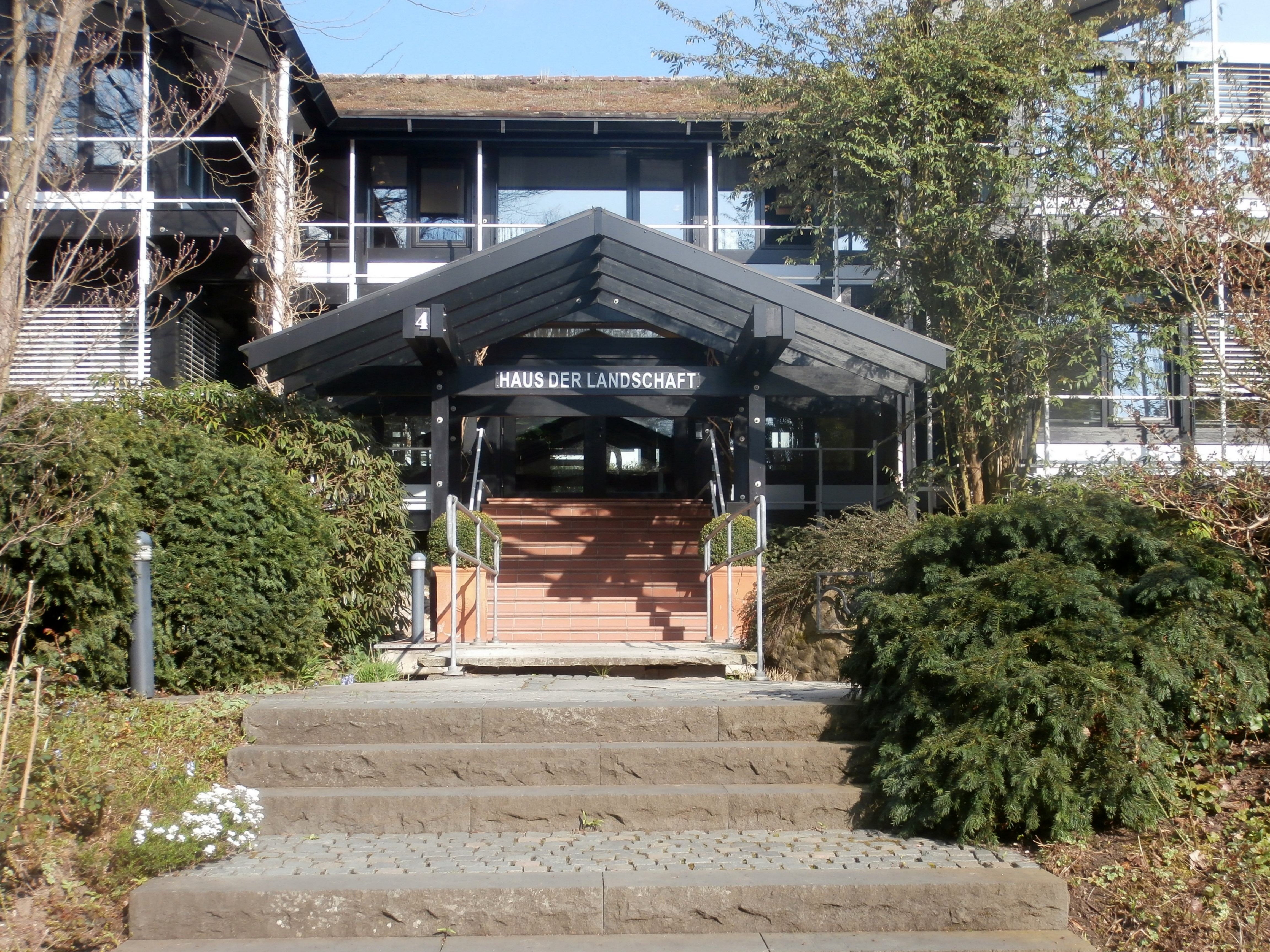 Haus der Landschaft, Alexander-von-Humboldt-Straße 4, Bad Honnef: Eingang